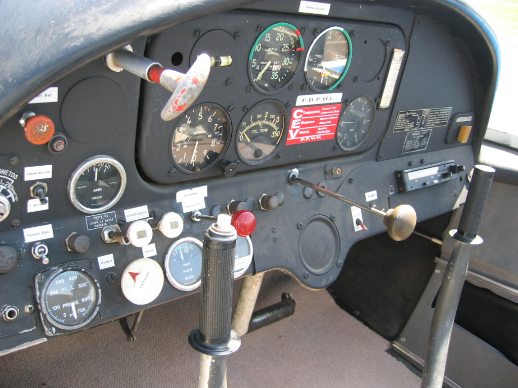 Avion de tourisme Morane-Saulnier Rally MS893 - aéro-club de Besançon Thise